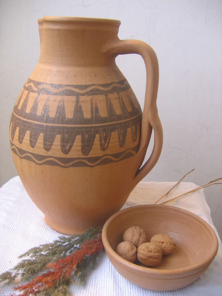 pottery from Săcel, Maramureș, Romania